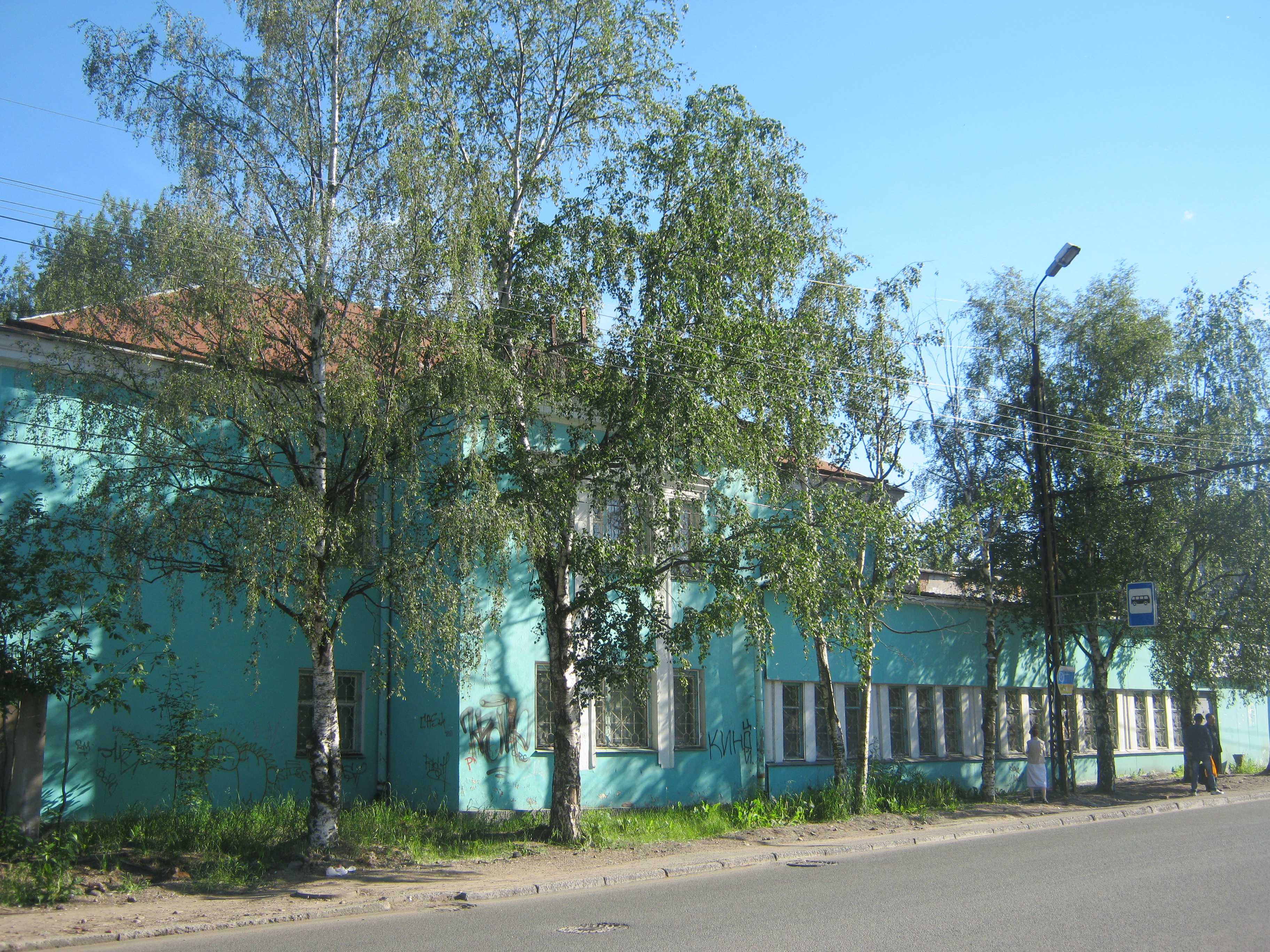 Промышленность Петрозаводска